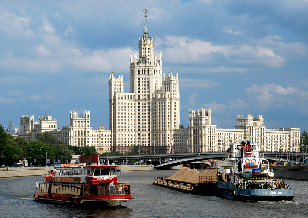 Вид с Москворецкой набережной на Москва-реку и высотное здание на Котельнической набережной